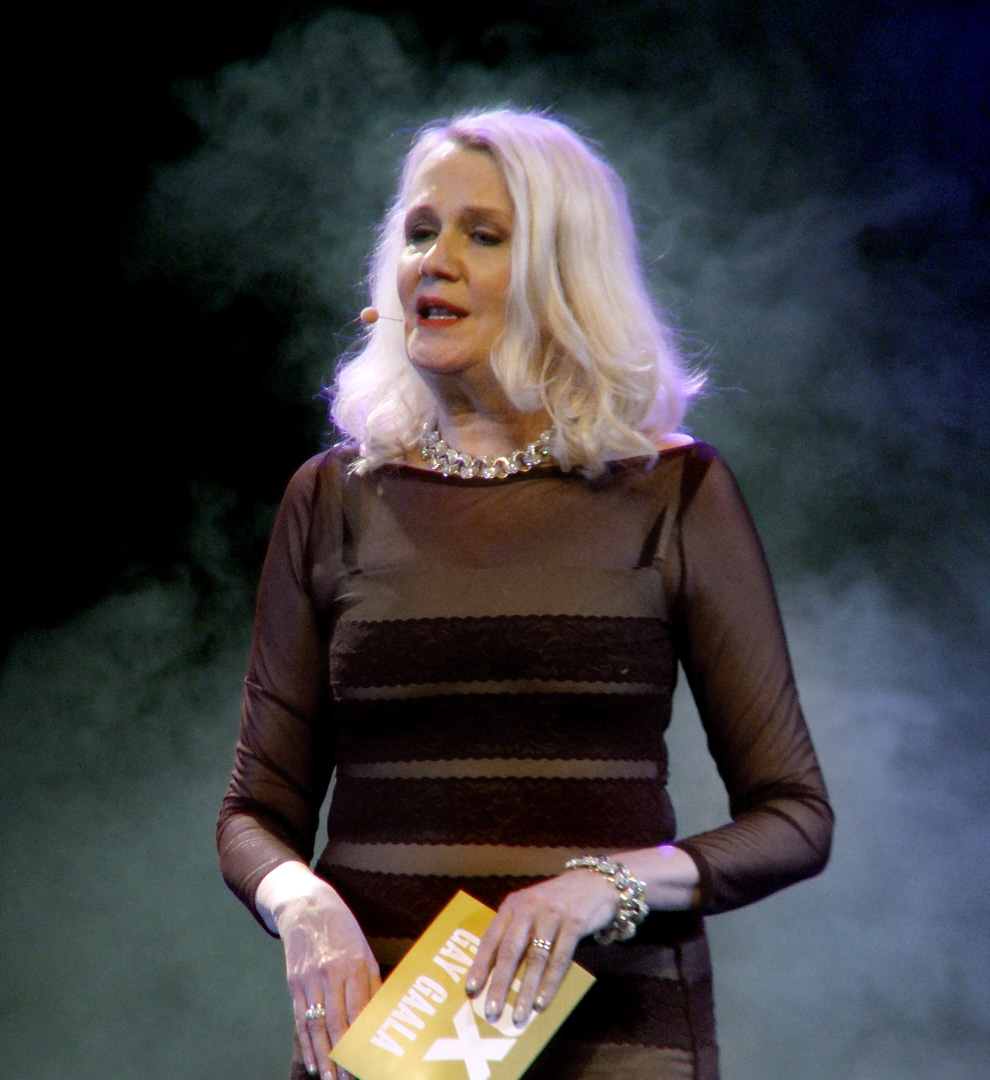 Miitta Sorvali juontamassa QX Gay Gaalaa Savoy-teatterissa Helsingissä helmikuussa 2016.